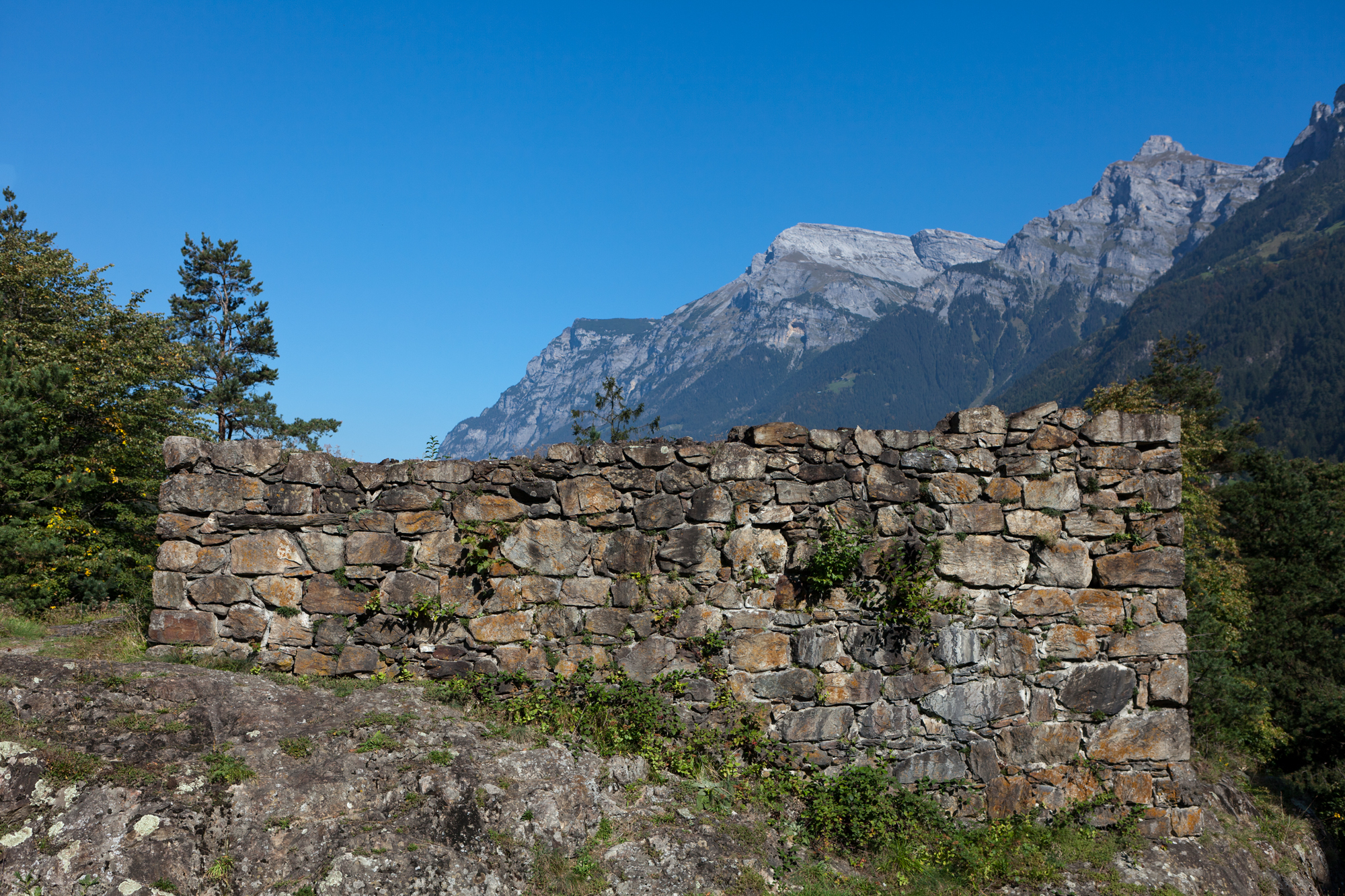 Die Zwing-Uri zwischen Amsteg und Silenen (Gemeinde Silenen)